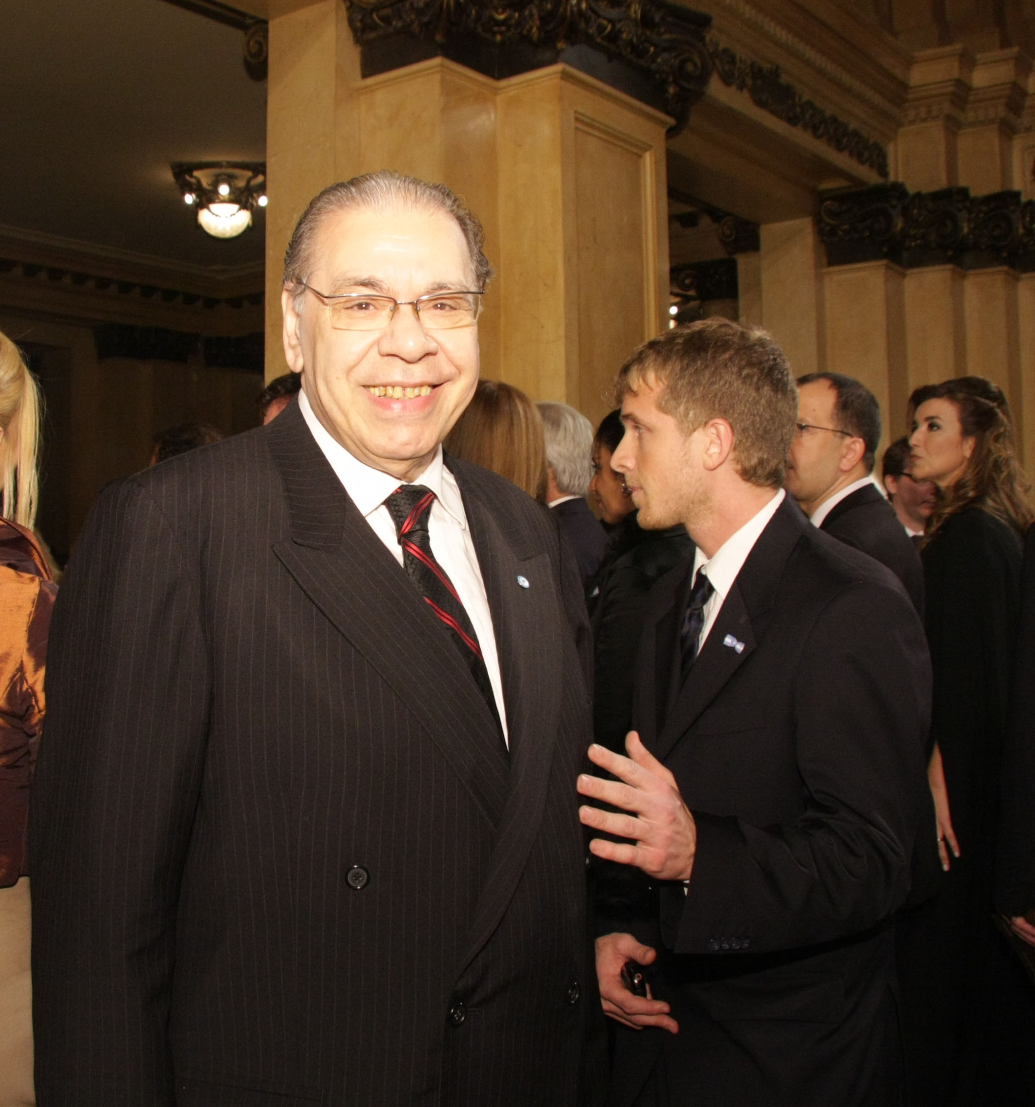 El actor Enrique Pinti en el Teatro Colón para la función de gala.